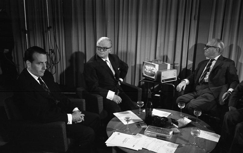 Bundestagswahl 1965. Im Bundeshaus (2. von links: Werner Höfer)